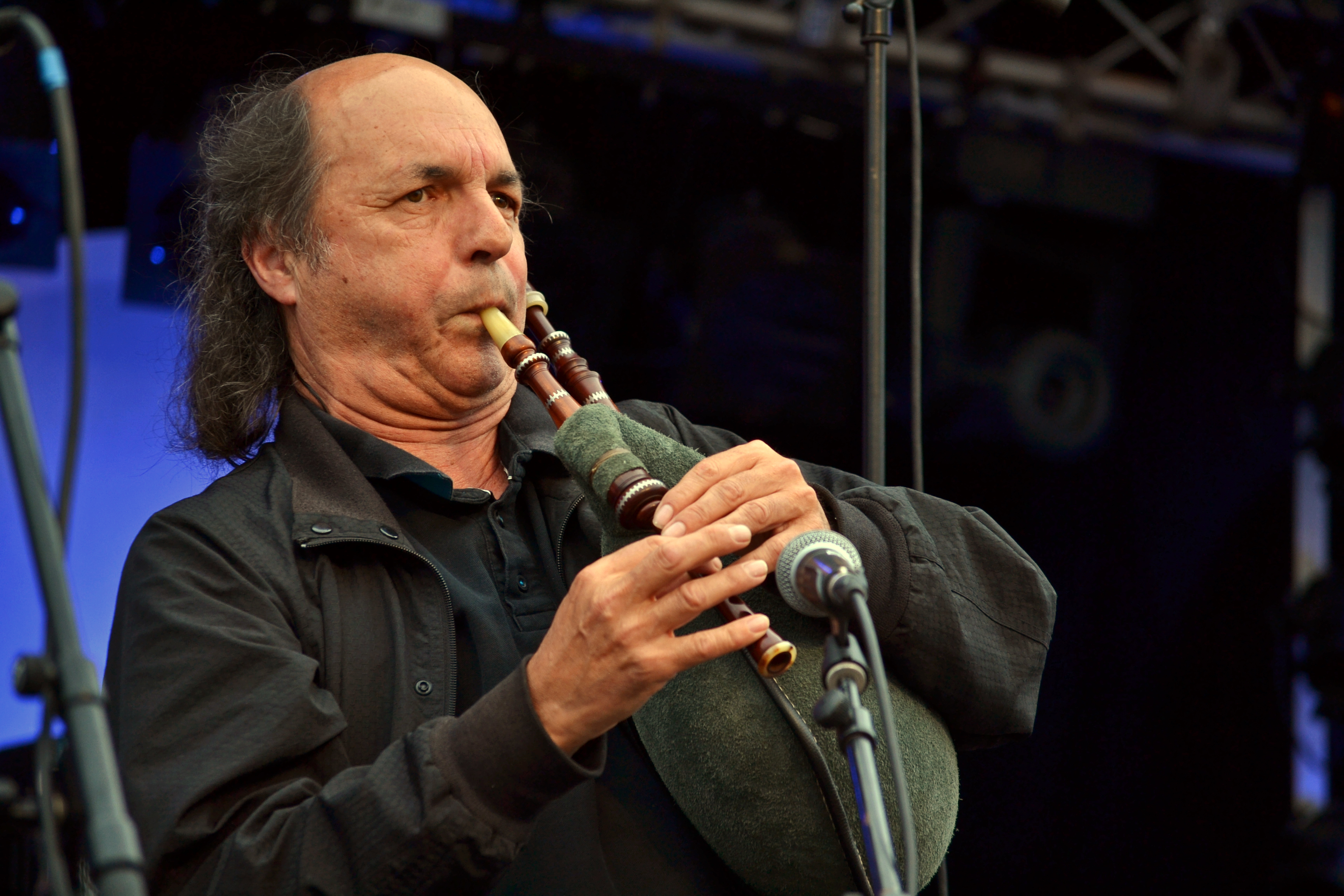 Patrick Molard sonne du biniou koz place de la Résistance à Quimper en hommage à Erwan Ropars dans le cadre du festival Cornouaille 2015.